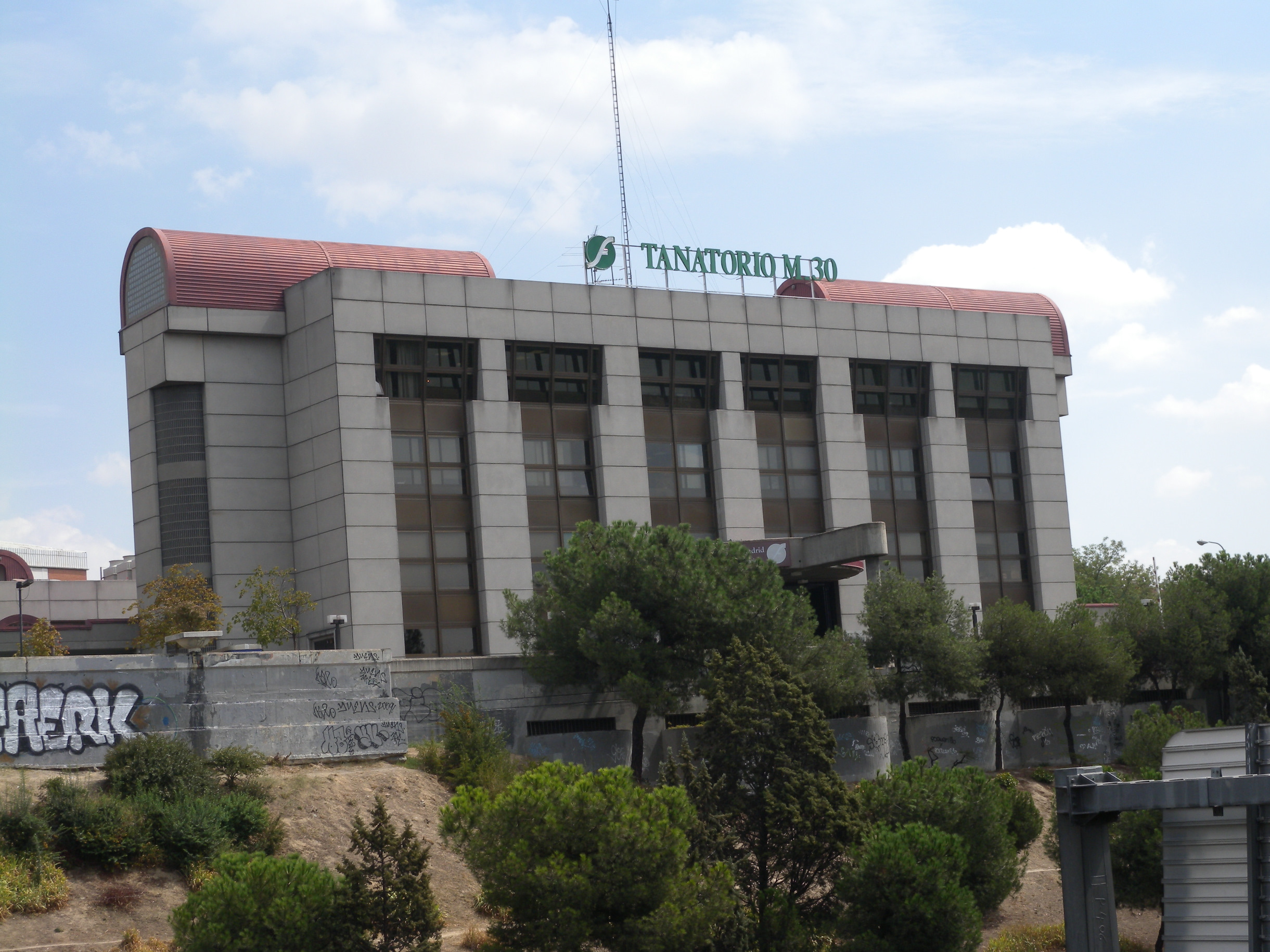 Tanatorio M30